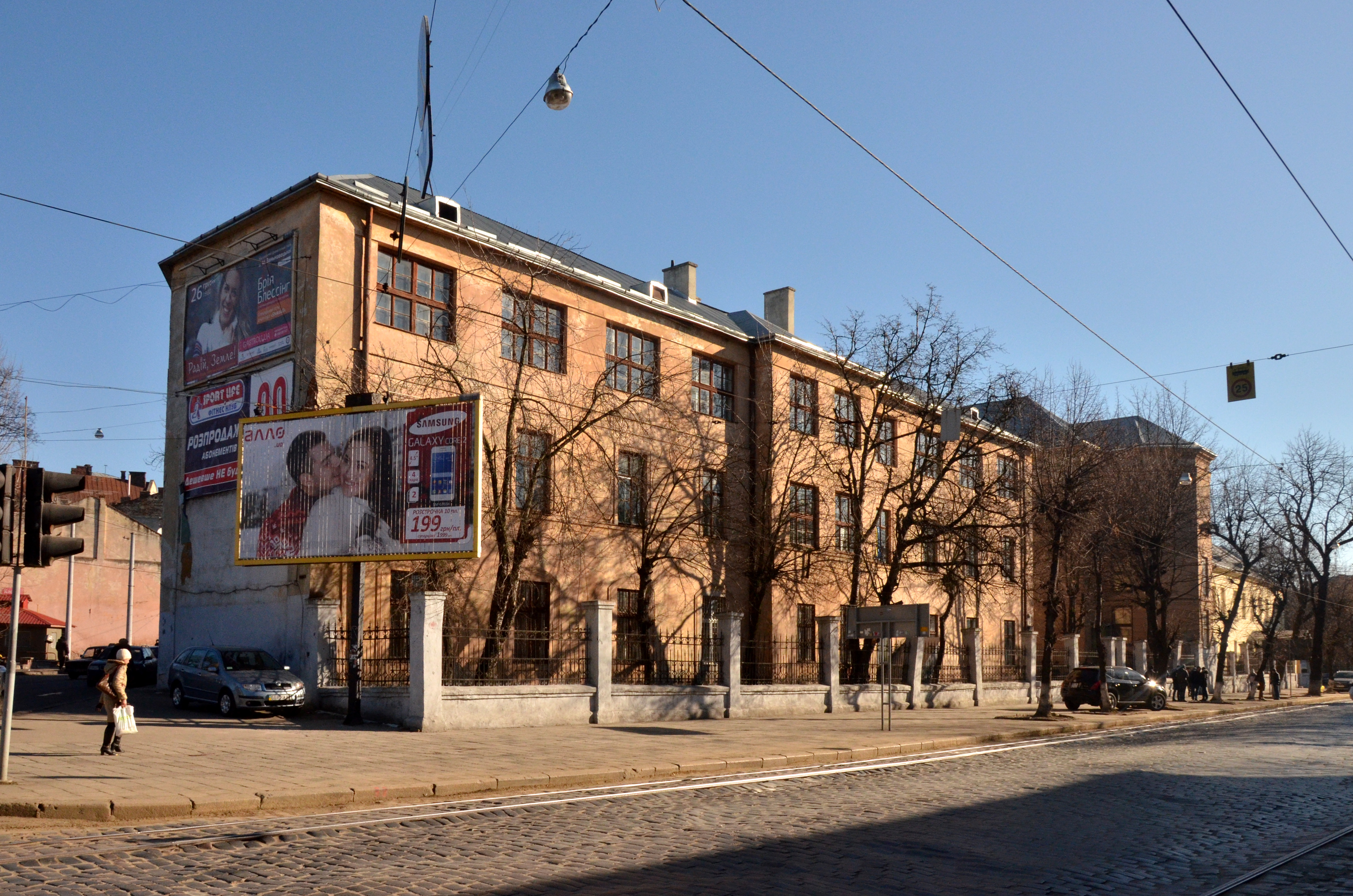 Будинок № 32-32a на вулиці Бандери у Львові.